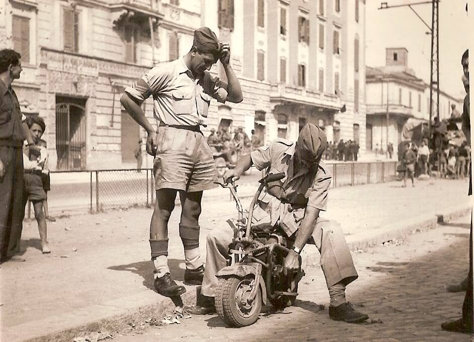 Aeromoto Volugrafo catturata da truppe inglesi